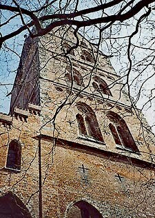 Foto stammt von mir, aus dem Jahre 2003. --Debauchery 13:04, 16. Aug 2005 (CEST) Ganz vergessen. Dies ist die Aegiedienkirche in Lübeck. --Debauchery 10:51, 17. Aug 2005 (CEST) Die Kirche trägt den Namen: Aegidienkirche Ich bin im Haus Aegidienstraße 75 geboren